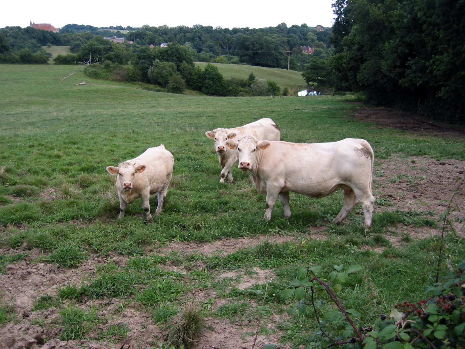 Race charolaise